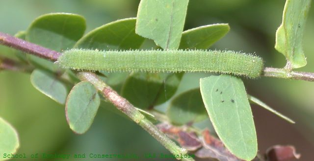 Eurema hecabe caterpillar